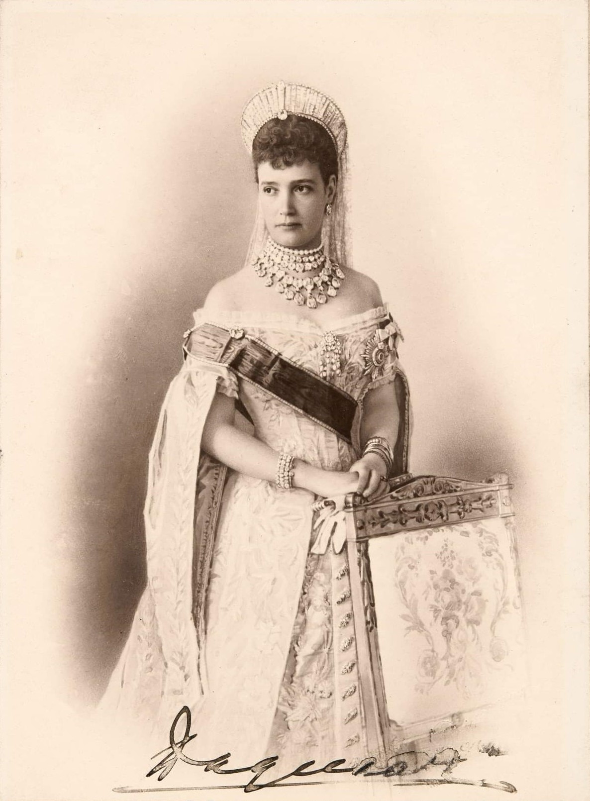 Maria Fyodorovna portret